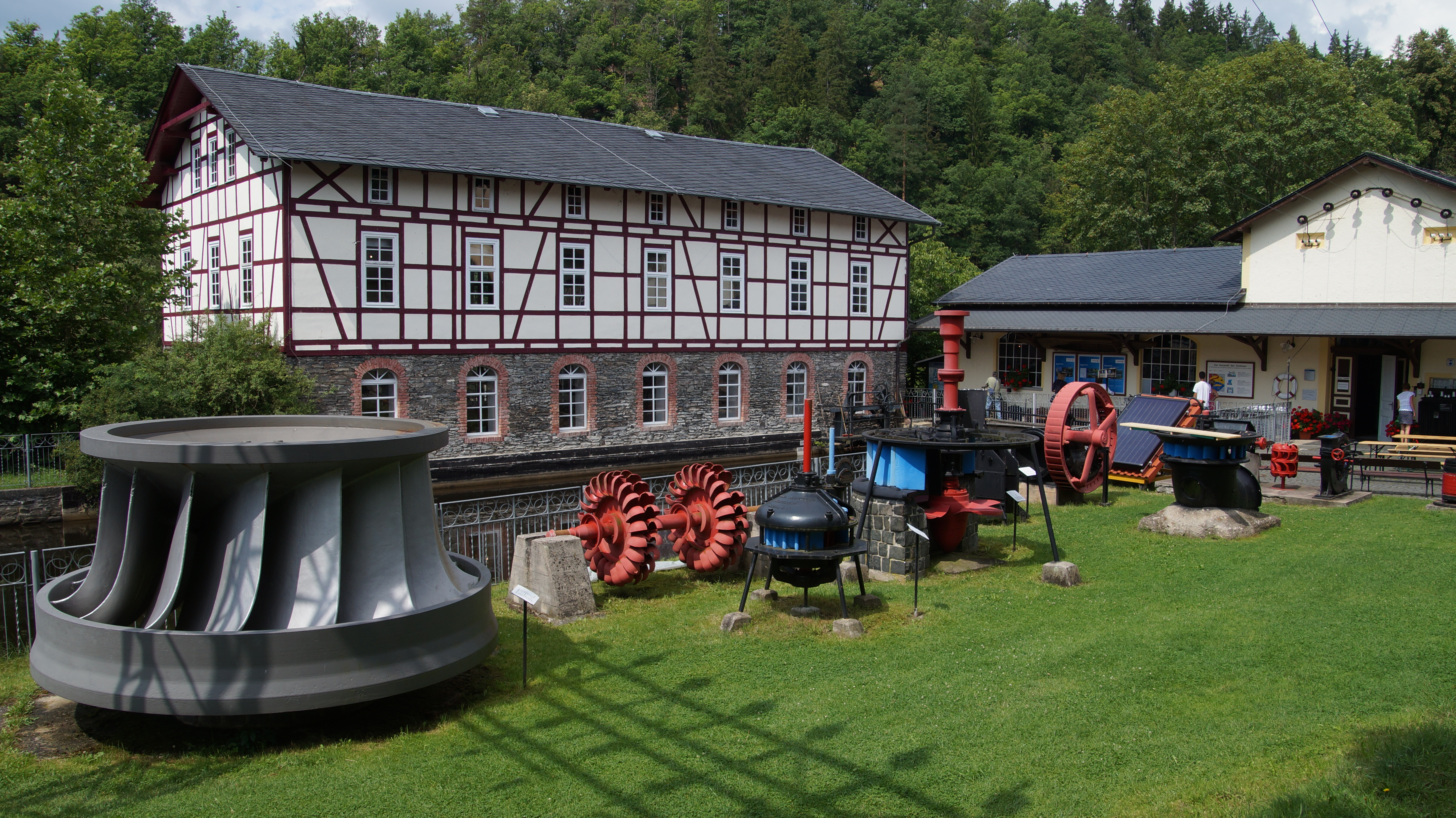 Wasserkraftmuseum Ziegernrück